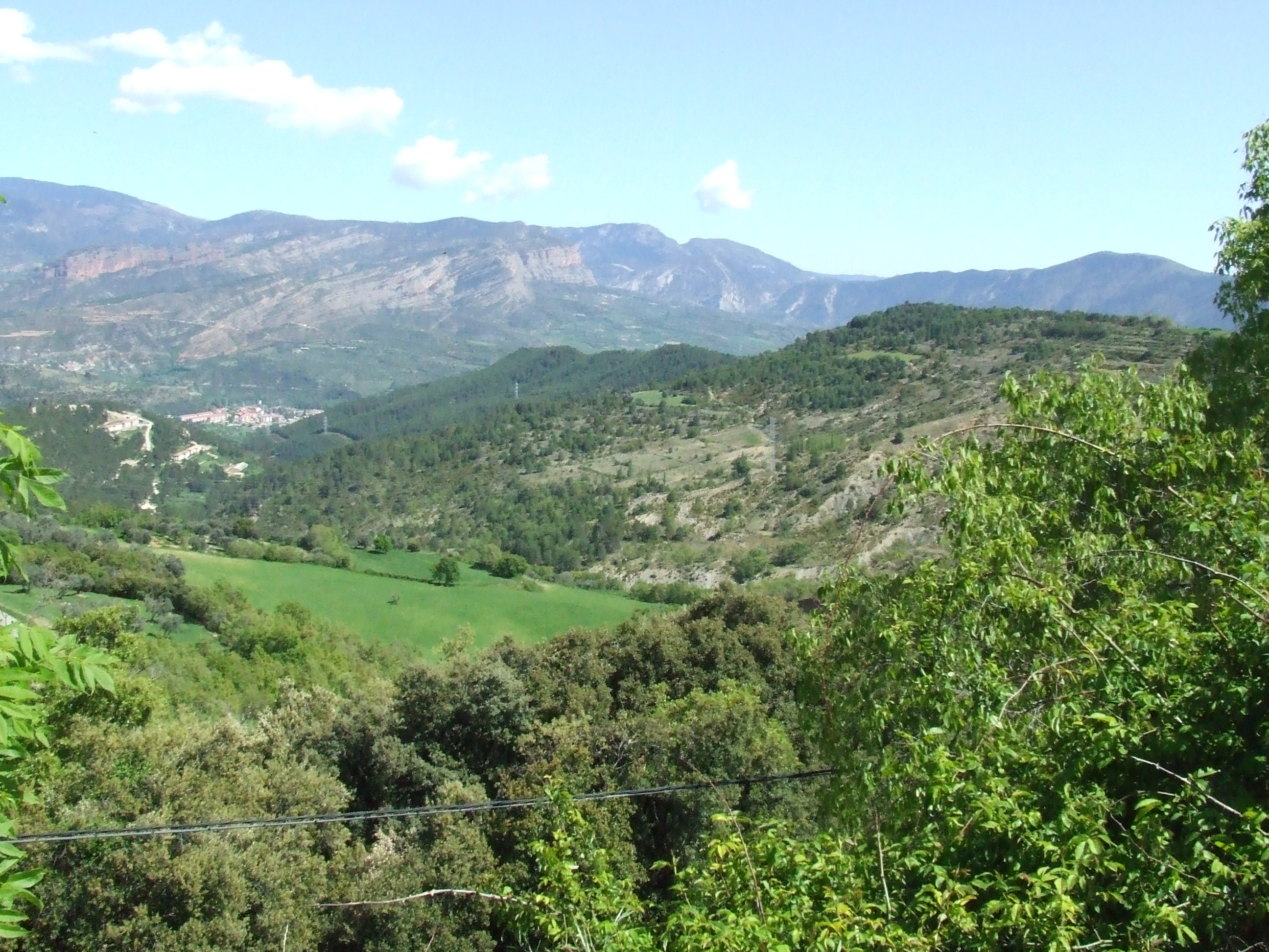 Serra de Ramonic (Toralla i Serradell, Conca de Dalt, Pallars Jussà)